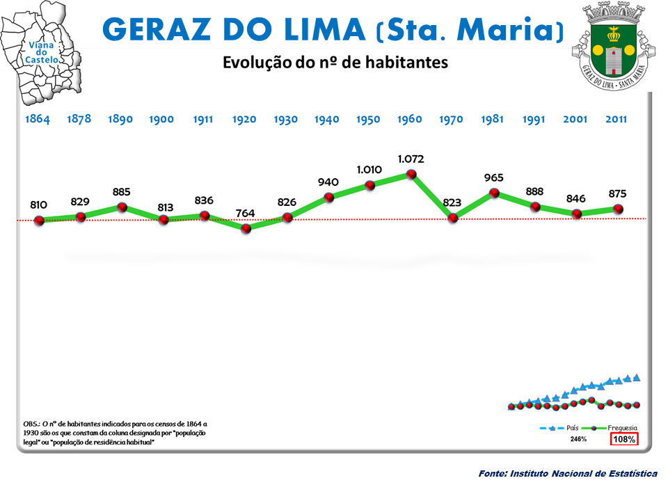 Censos 1864/2011